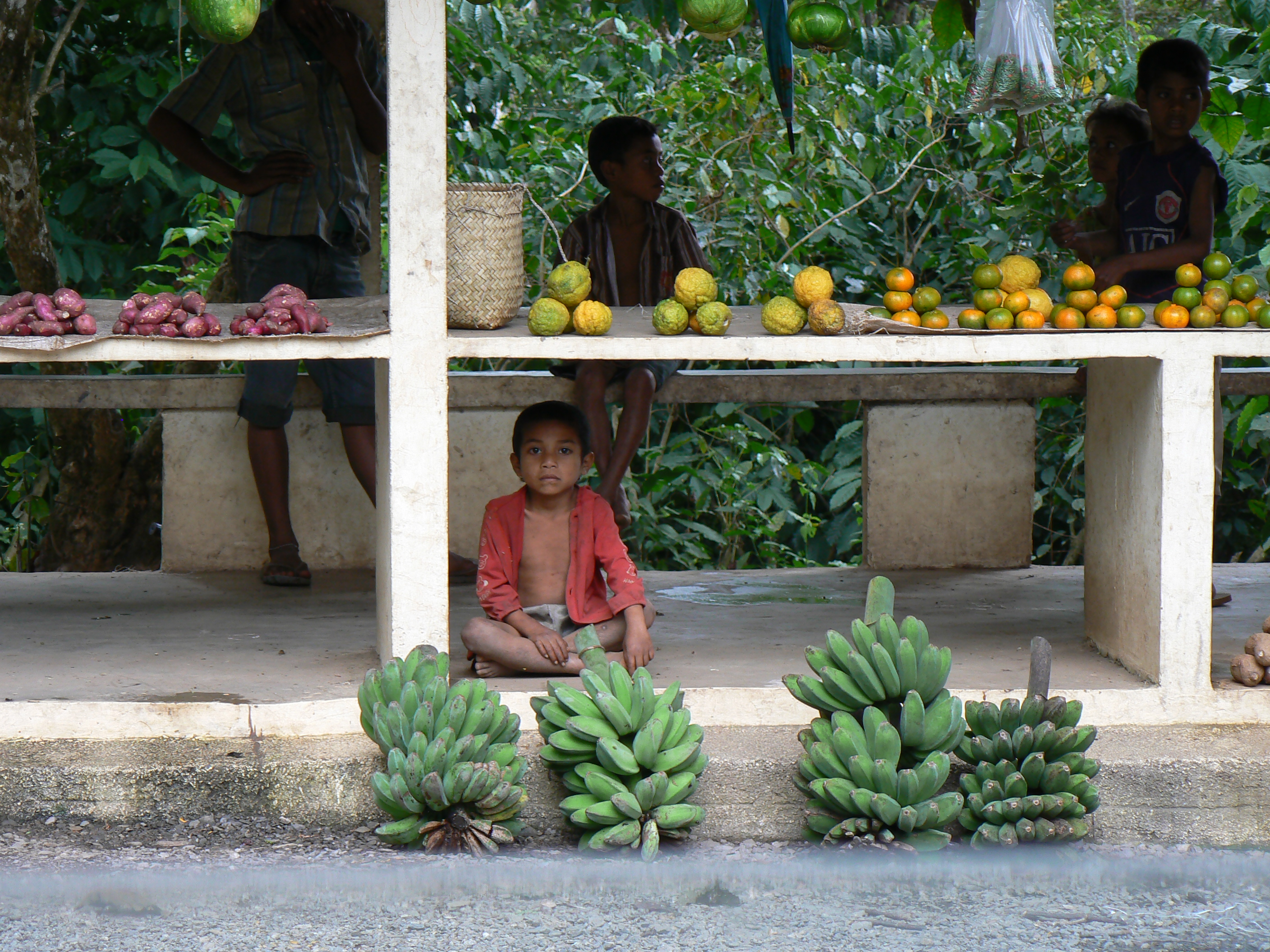 Obststand in Aihatutu, Fatuquero, Ermera